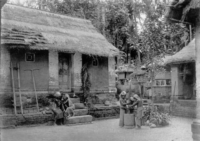 Foto. Bali, dorpstafereel.